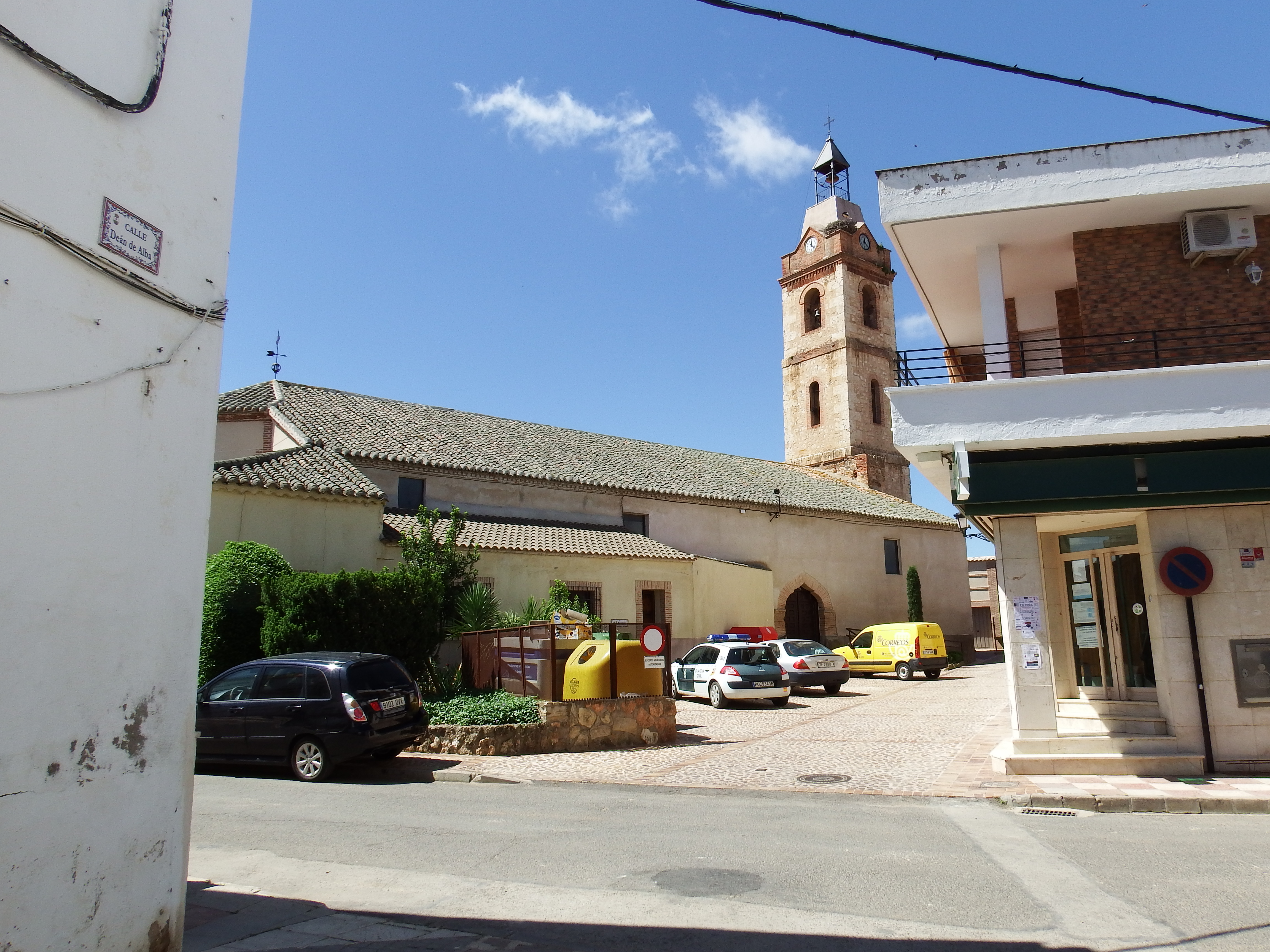 Corral de Calatrava